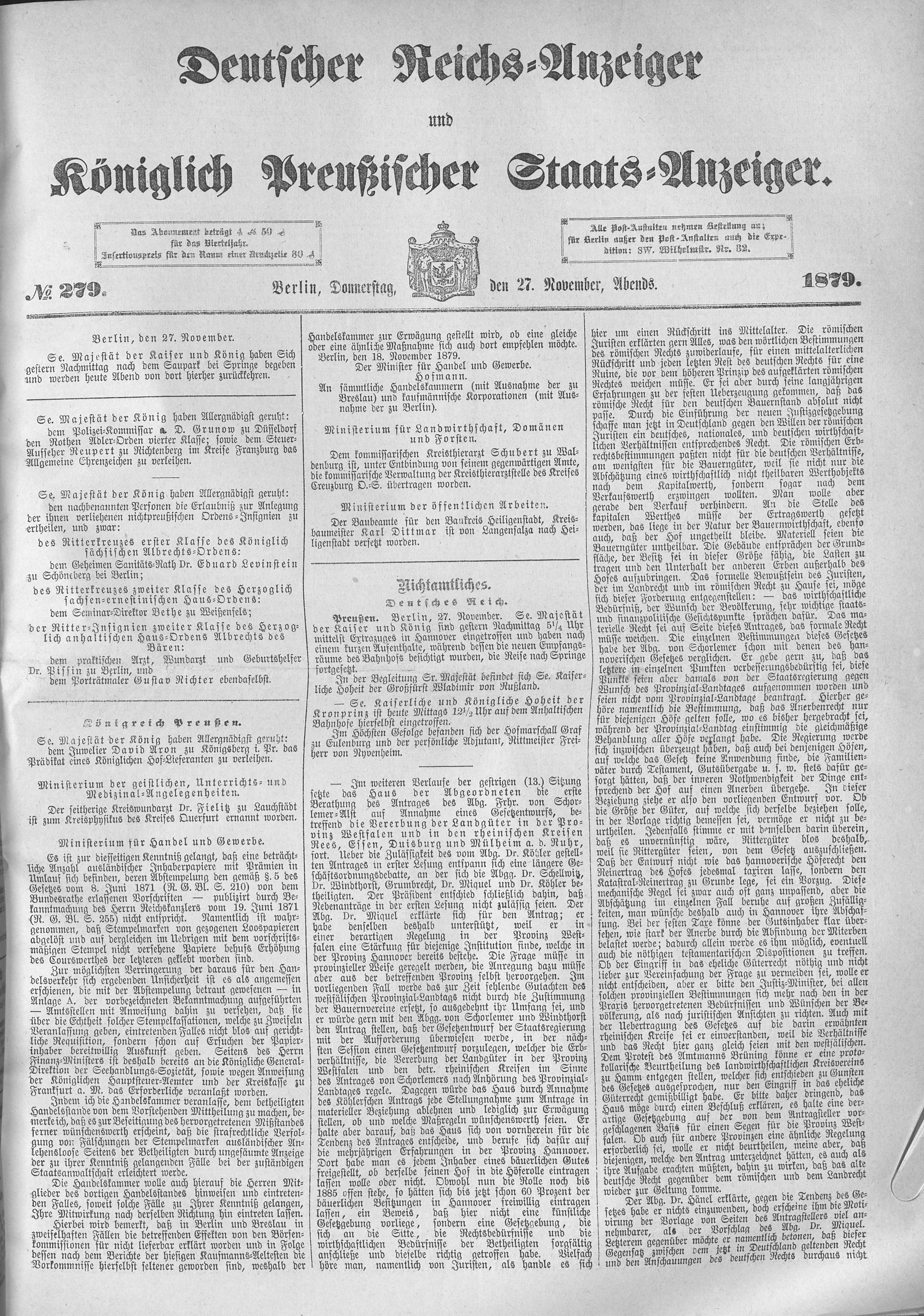 Deutscher Reichsanzeiger 1879, No. 279, Titelseite